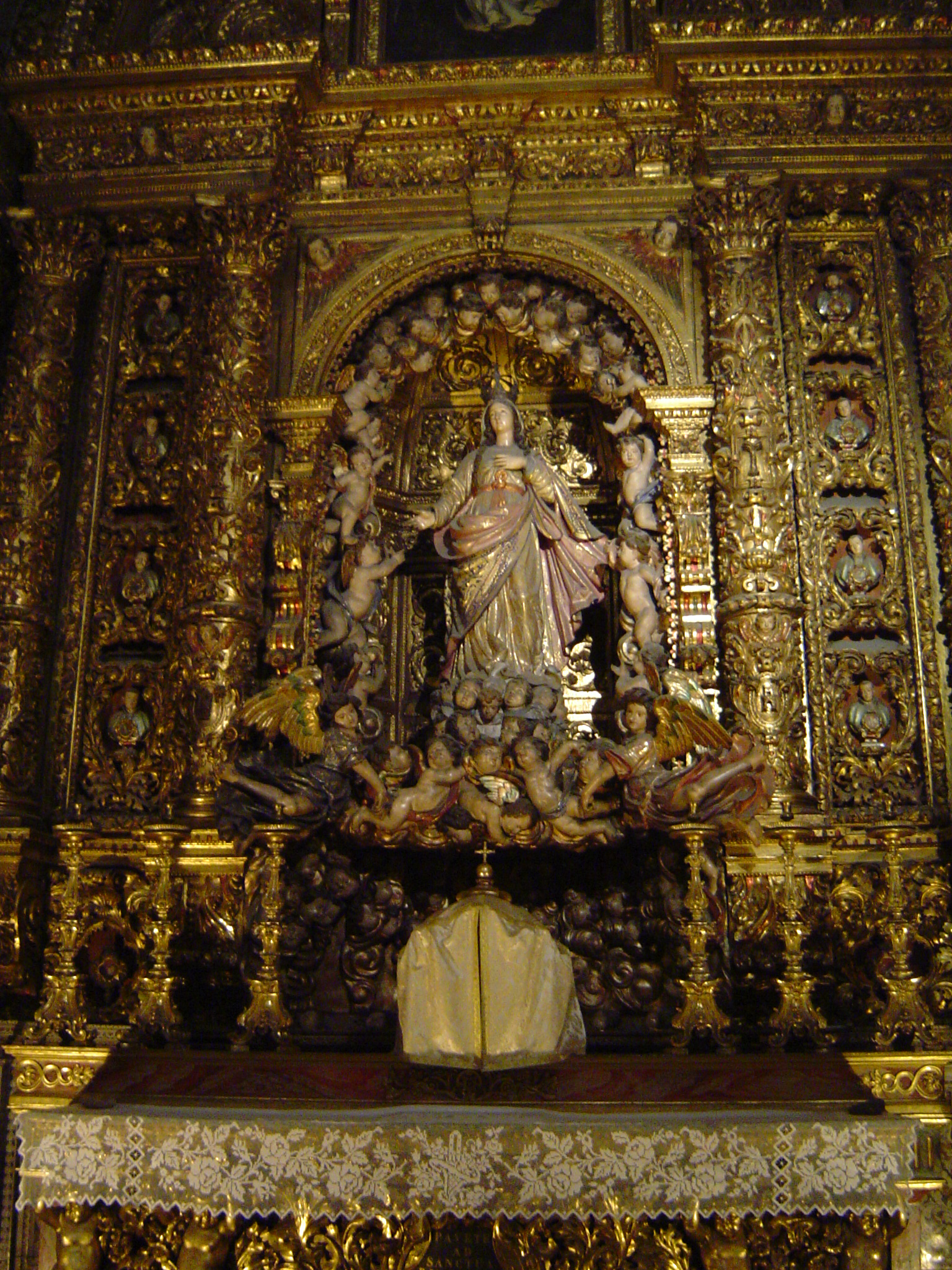 Altarpiece inside Sao Roque Church, Lisbon